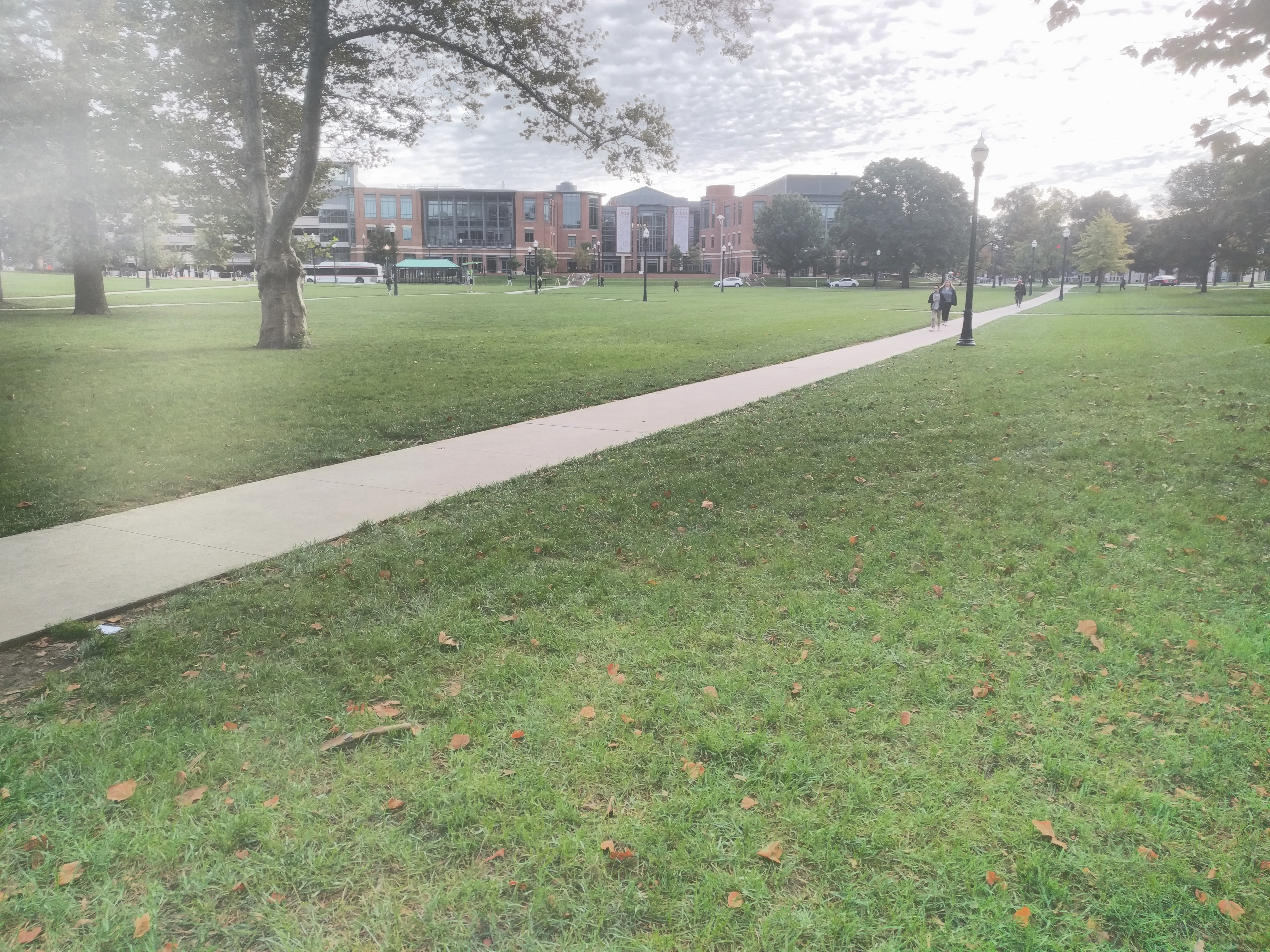 astronomical observatory